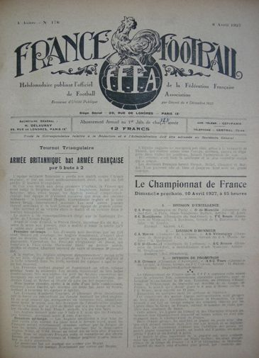 première page du journal sportif France-football no.176, du 8 avril 1927